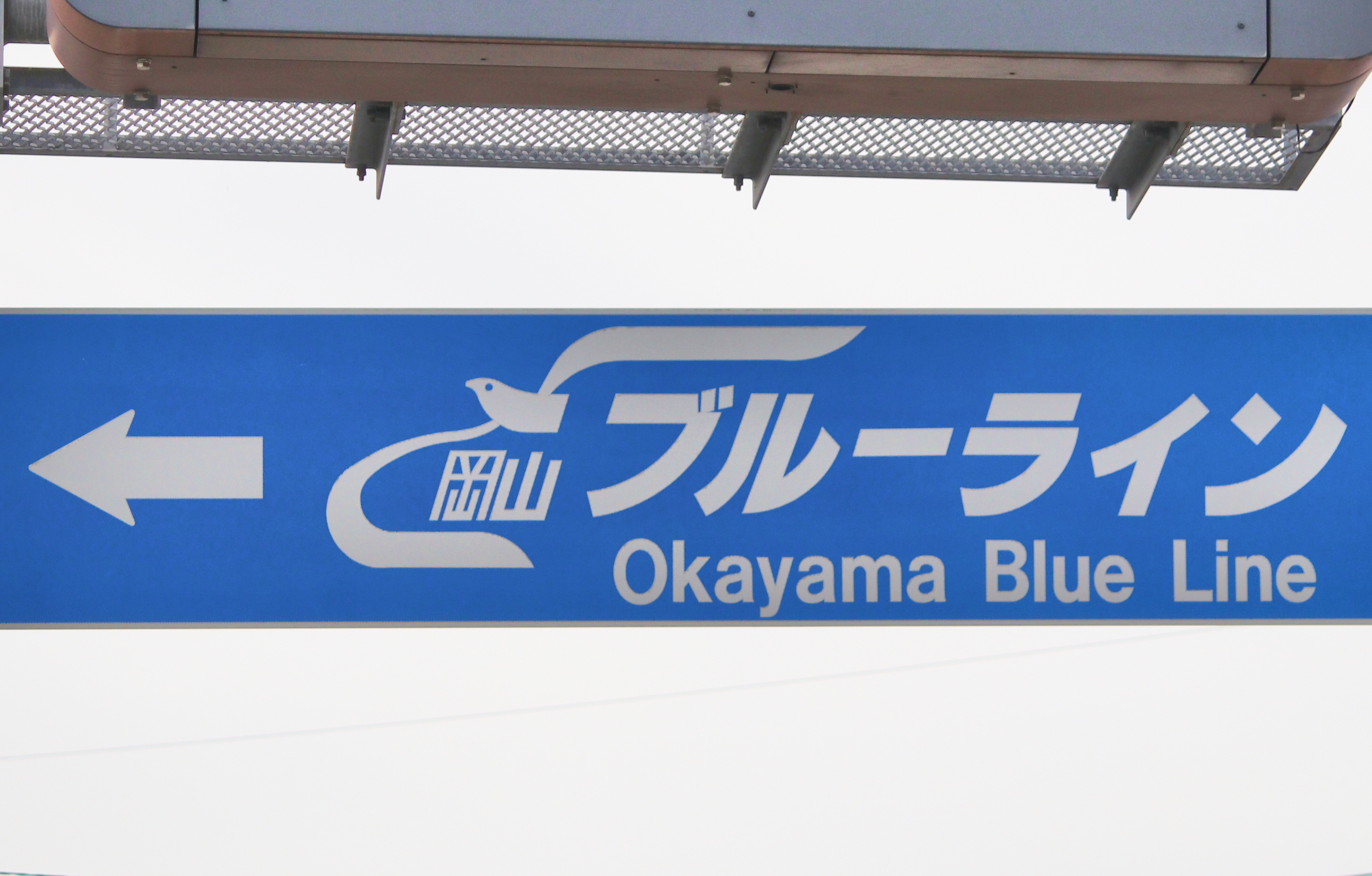 岡山ブルーライン ロゴサイン（西大寺ICにて） Canon EOS 80D